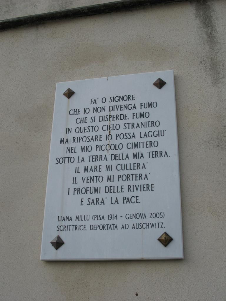 Targa in memoria di Liana Millu presso Boccadasse (Genova), Liguria, Italia